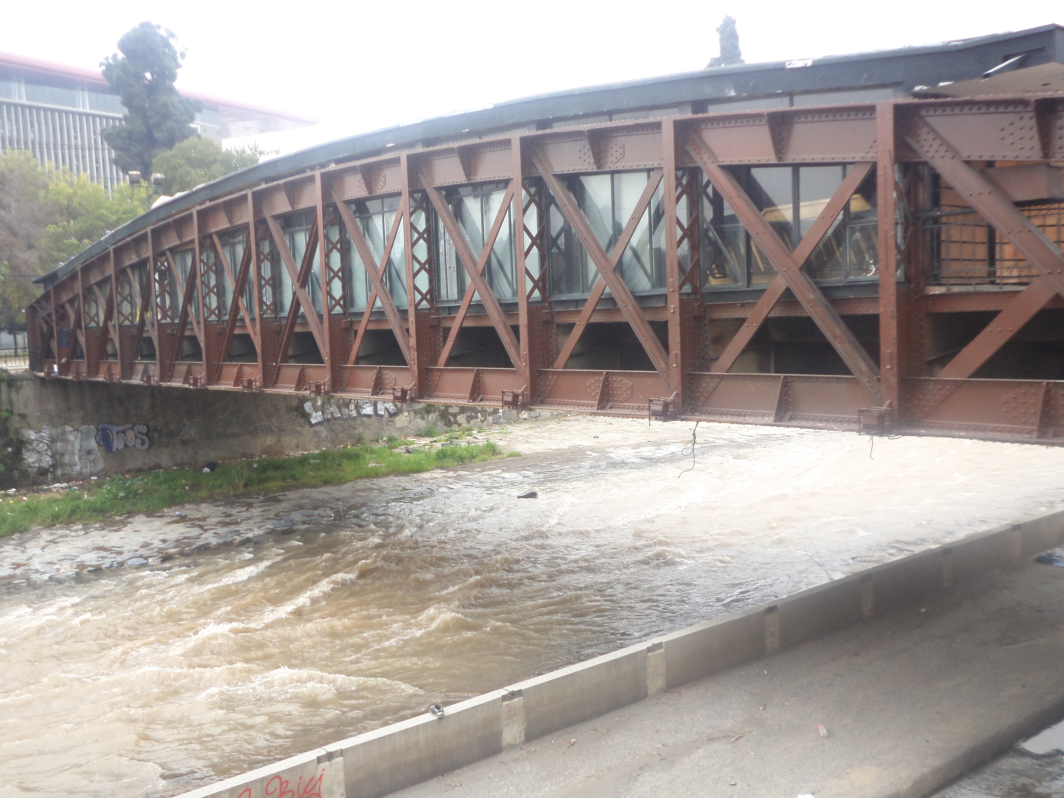 Puentes metálicos sobre el río Mapocho This is a photo of a national monument in Chile: 901